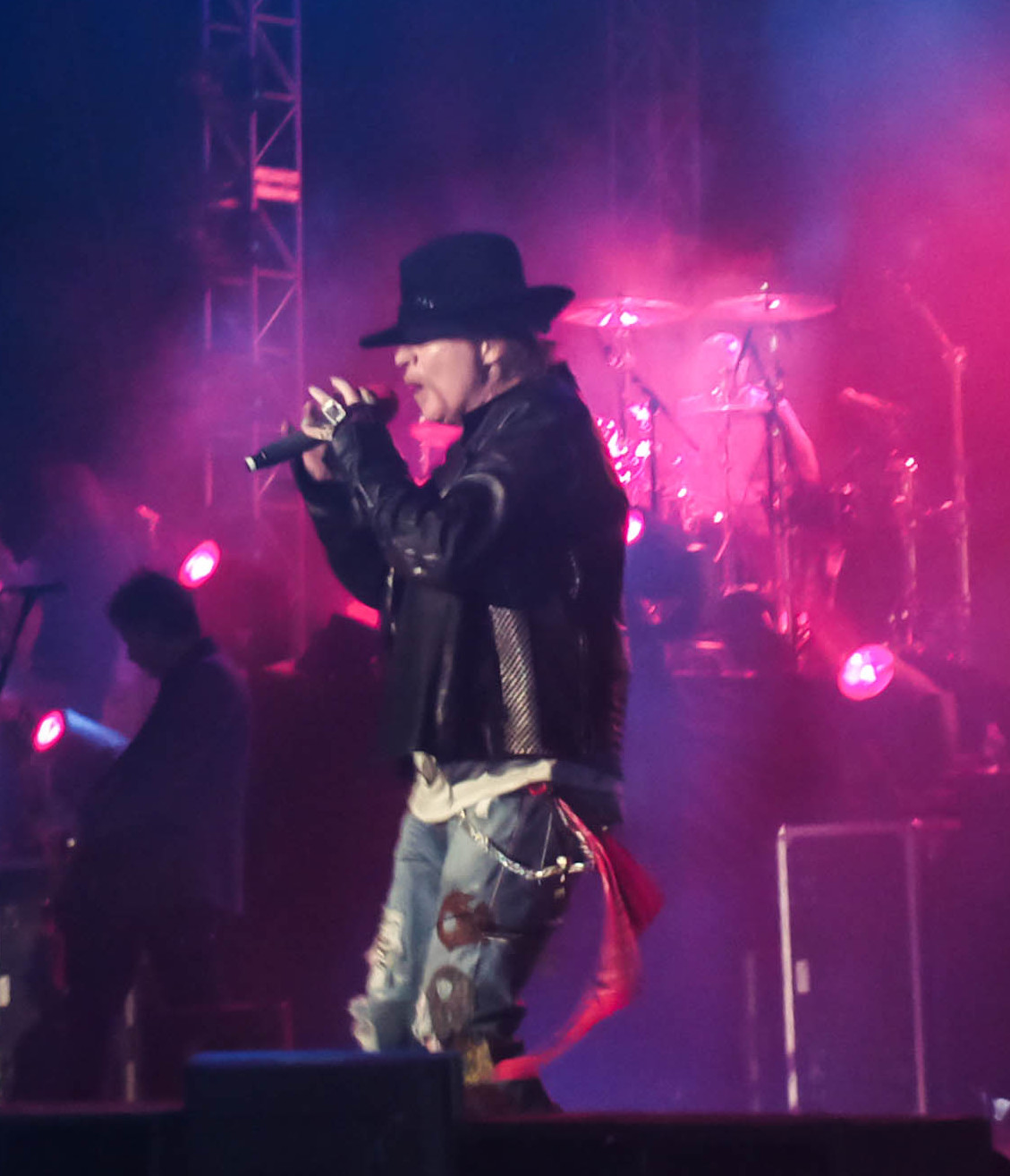 2012-12-07-0072.jpg